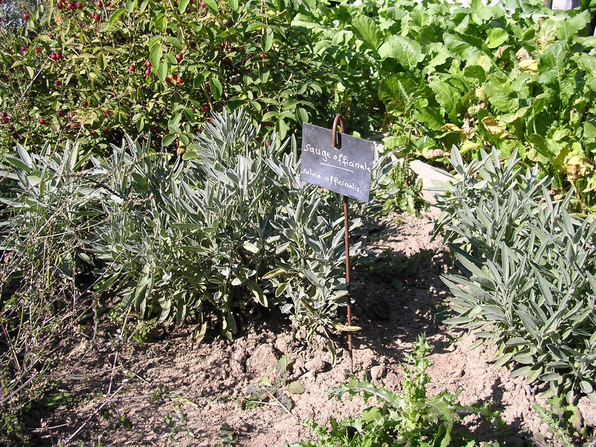 sauge